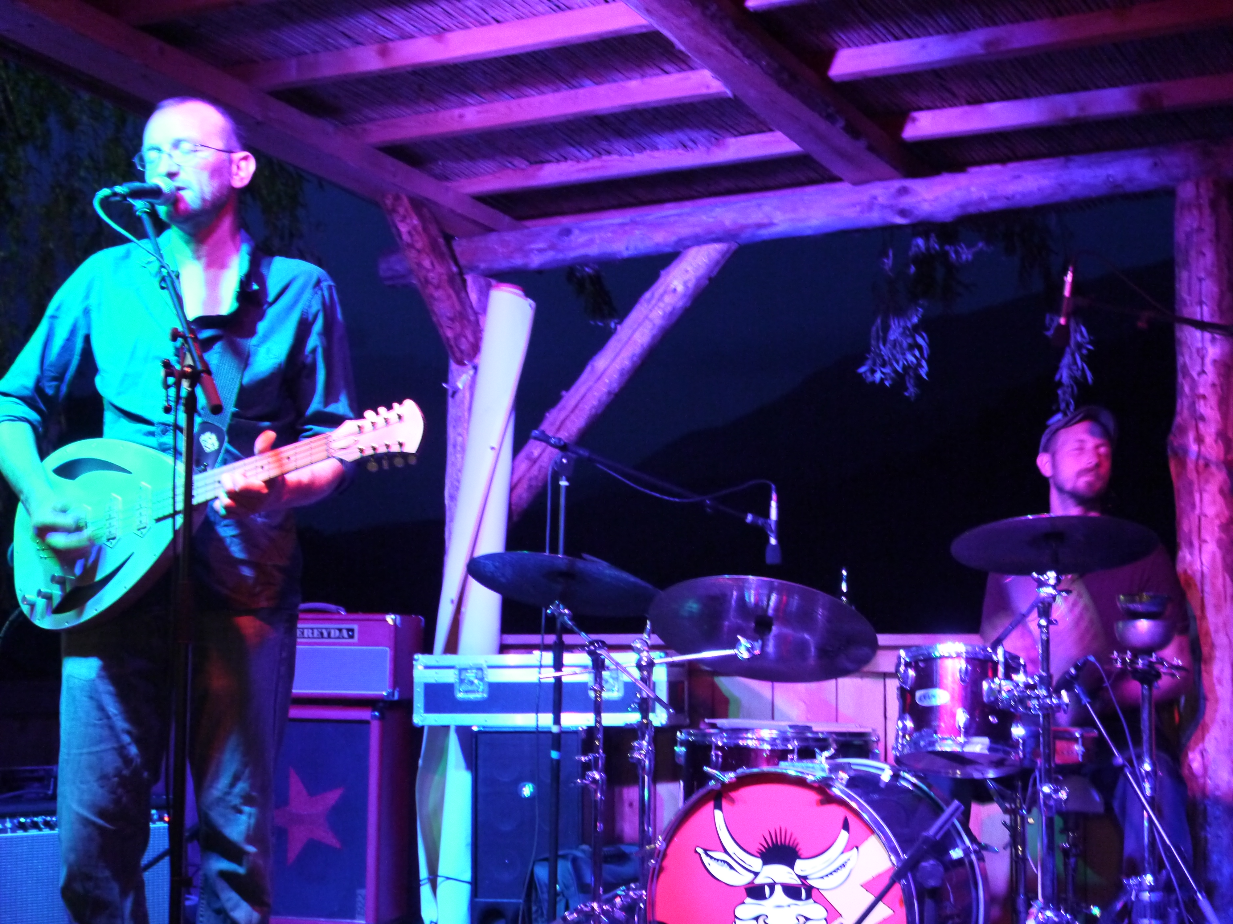 Concert à St André des Alpes